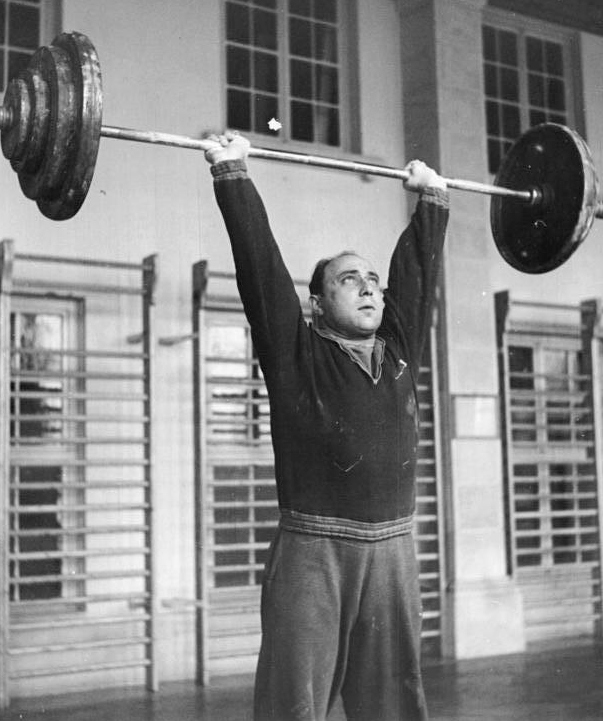 Günter Siebert Zentralbild Wlocka Wlo-Ho 30.10.1957 Oberleutnant Günter Siebert vom ASK Vorwärts Berlin, Dritter bei den Weltfestspielen in Moskau im Gewichtheben in der Leichtschwergewichtsklasse, zum 40. Jahrestag der grossen Sozialistiscgen Oktoberrevolution." In den 40 Jahren seit ihrem Bestehen hat sich die Sowjetunion zur führenden, mächtigen Kraft entwickelt. Das kommt nicht nur auf den Gebieten der Wirtschaft und der Kultur, sondern auch auf dem sportlichen Sektor zum Ausdruck. Ein gutes Beispiel für selbslose unterstützung gab uns die Sowjetunion, als sie im Jahre 1956 den sowjetischen Trainer Boris-Grigorjewitsch Pustawoit in die DDR entsandte. Hier stellte er seine reichen Erfahrungen den Trainern und Aktiven selbstlos zur Verfügung und weihte uns in die Geheimnisse des sowjetischen Trainings ein. Diese Anleitung hat uns in unserer Arbeit viel geholfen,und wir sind dem Staatlichen Komitee für Körperkultur und Sport der Sowjetunion dafür sehr dankbar. Wir wünschen den sowjetischen Sportlern, insbesondere den Gewichthebern, weiterhin viel Erfolge im internationalen Sport und beim Aufbau ihres Staates."" UBz: Günter Siebert während des Trainings.